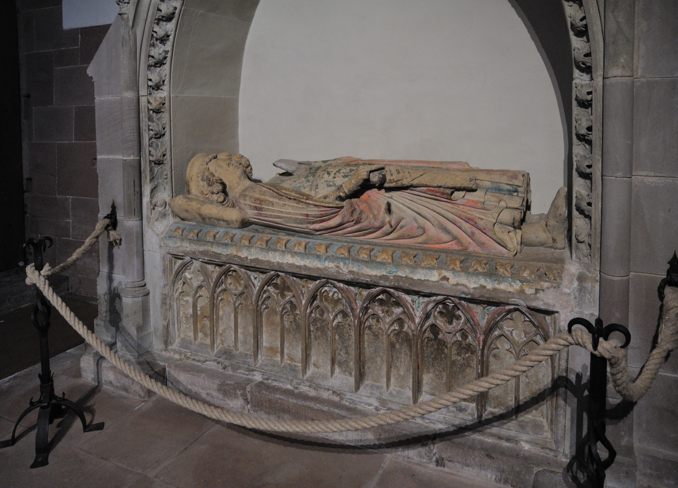 Abteikirche Murbach: Gründerfigur